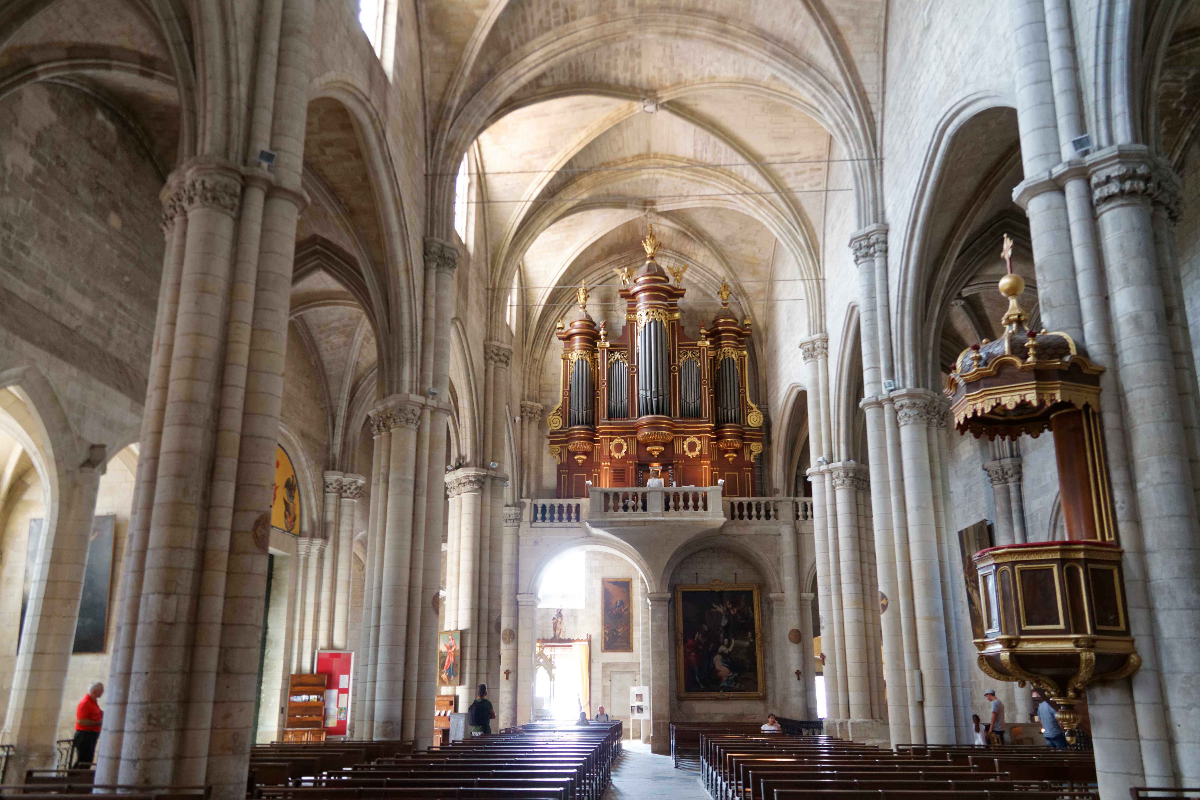 Église Sainte-Marthe in Tarascon